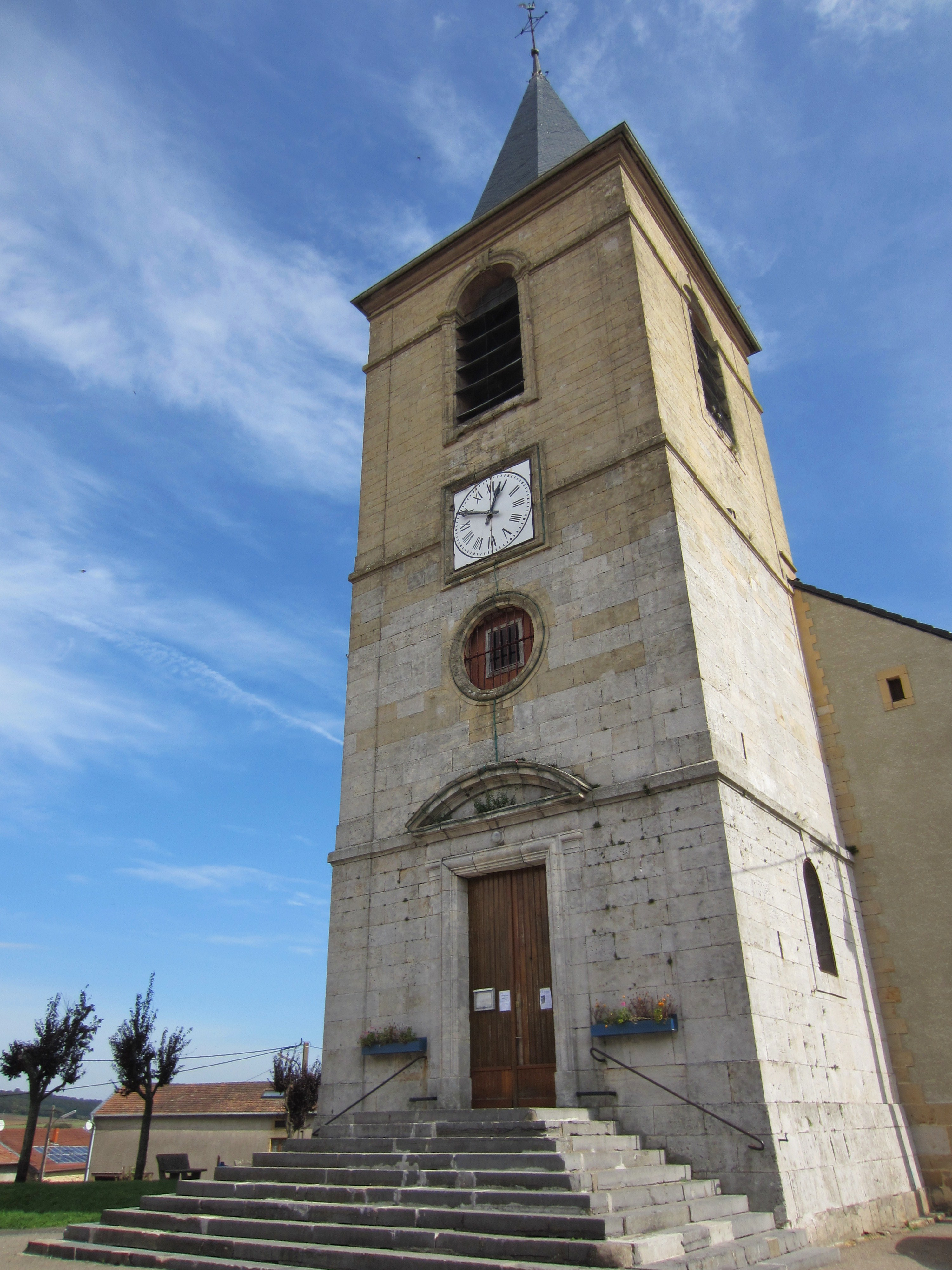 Description eglise Serrouville Date16 September 2011Sourcemon appareil photoAuthorAimelaimePermission (Reusing this file) eglise Serrouville